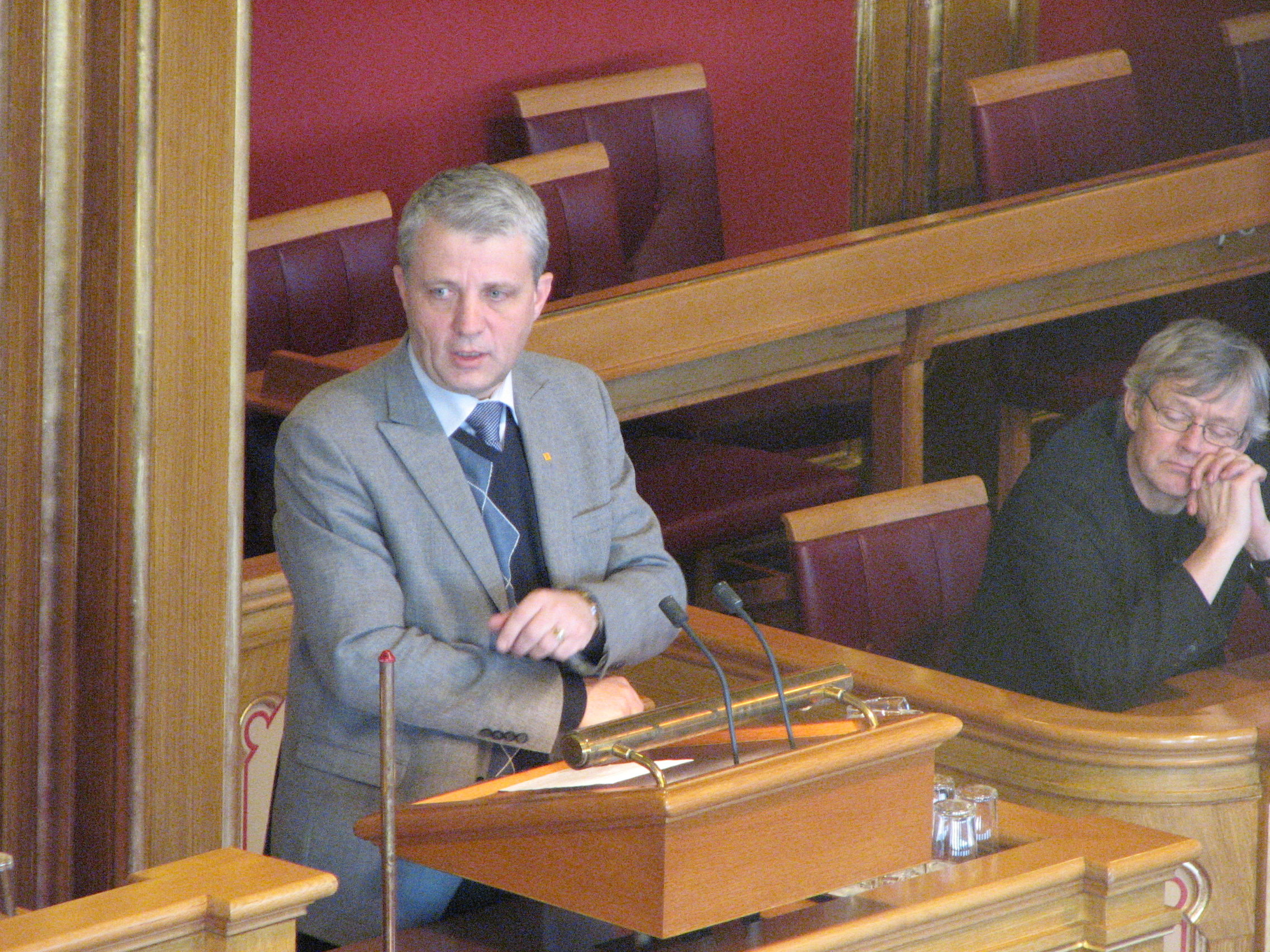 Stortingsrepresentant Dagfinn Høybråten for Rogaland KrF i Stortinget 12. februar 2009.